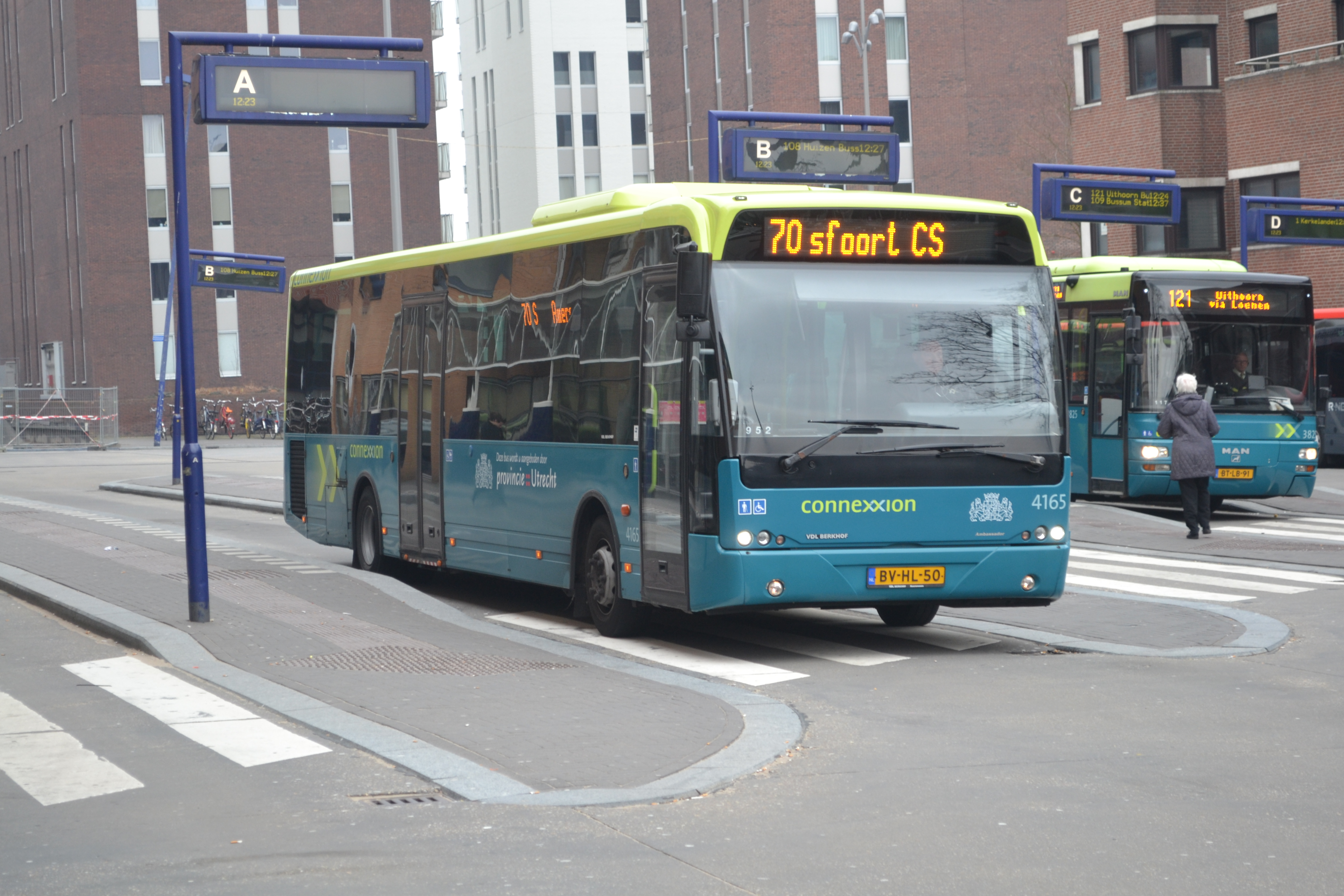 Connexxion 4165 op lijn 70 naar Amersfoort, te Hilversum station